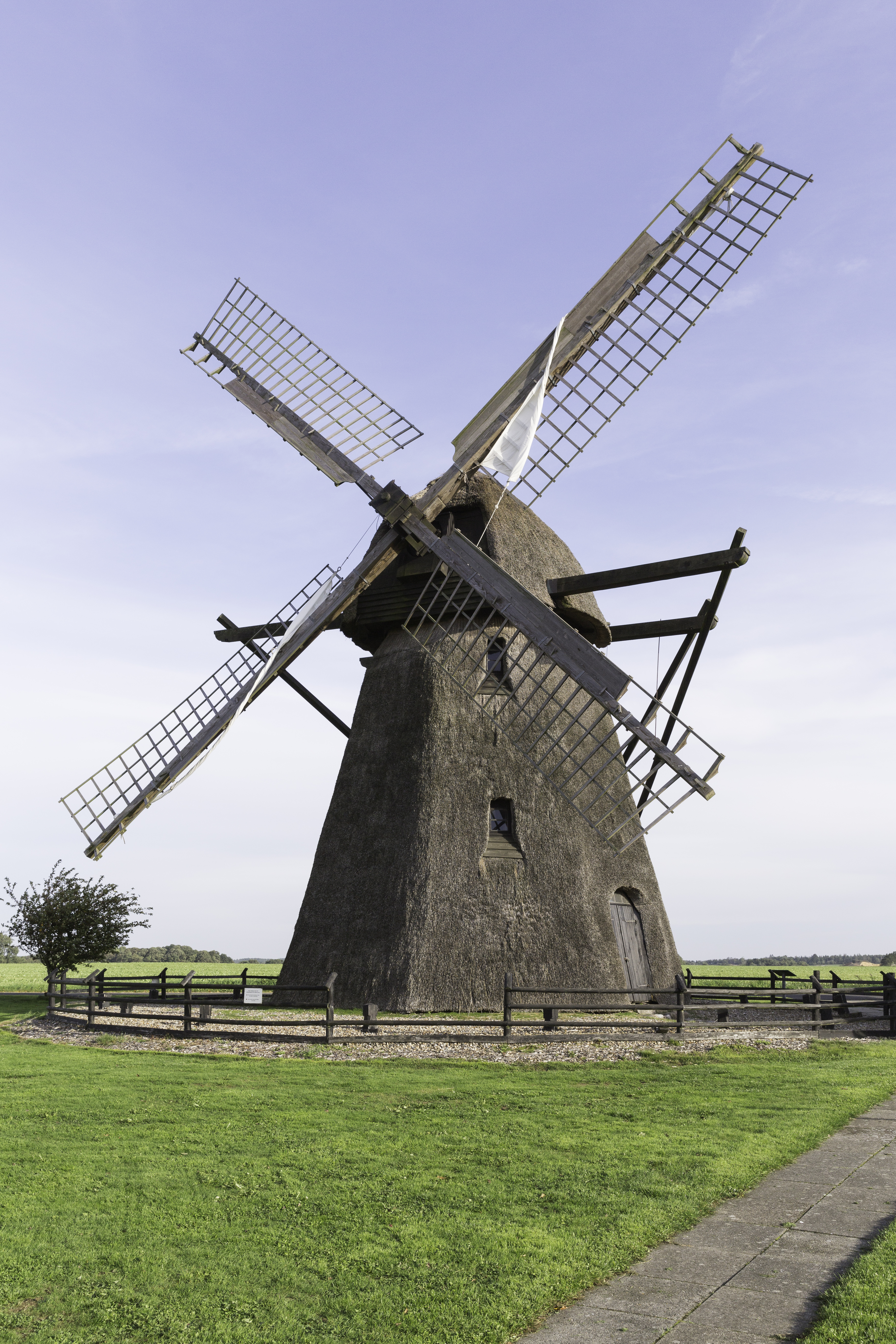 Branduhre Mølle